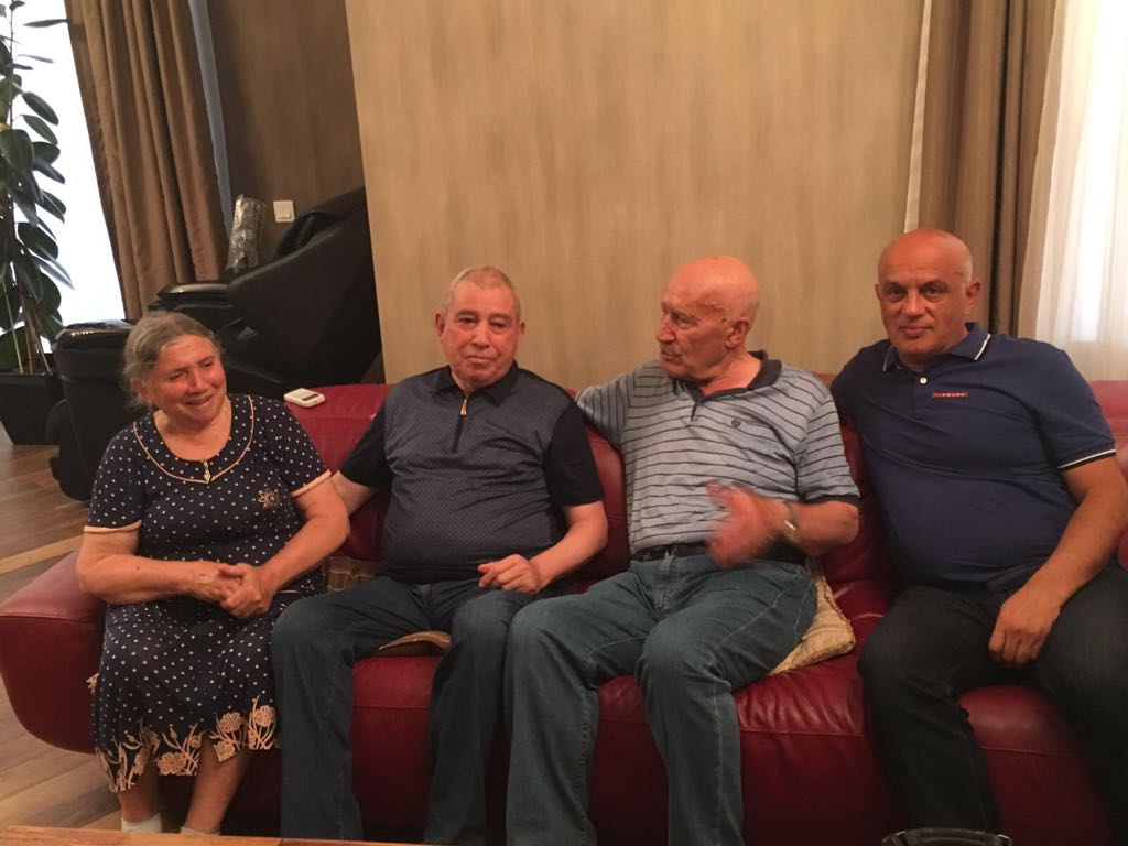 Ələddin müəllim tələbə yoldaşı İsmayıl müəllim və oğlu Əlövsətlə birgə